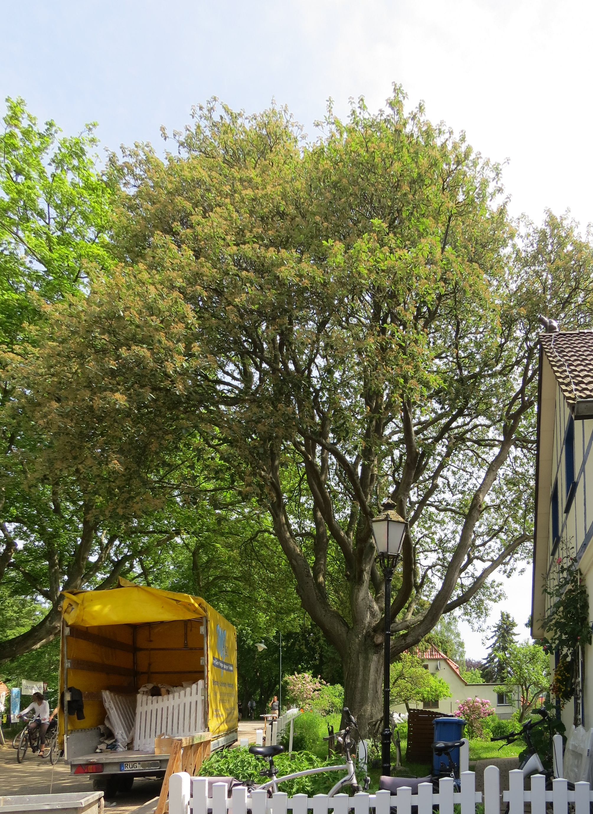 Hiddensee, Ort Kloster, Baumdenkmal Schwedische Mehlbeere